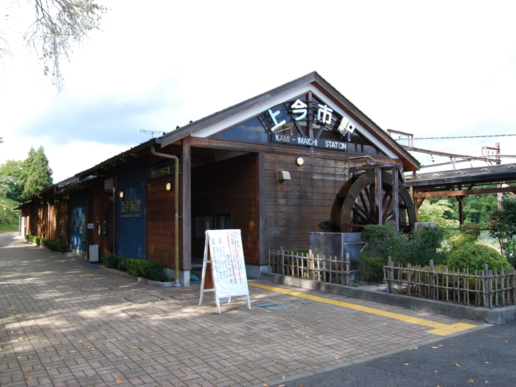 東武鉄道日光線上今市駅駅舎全景（2008/10/28撮影）